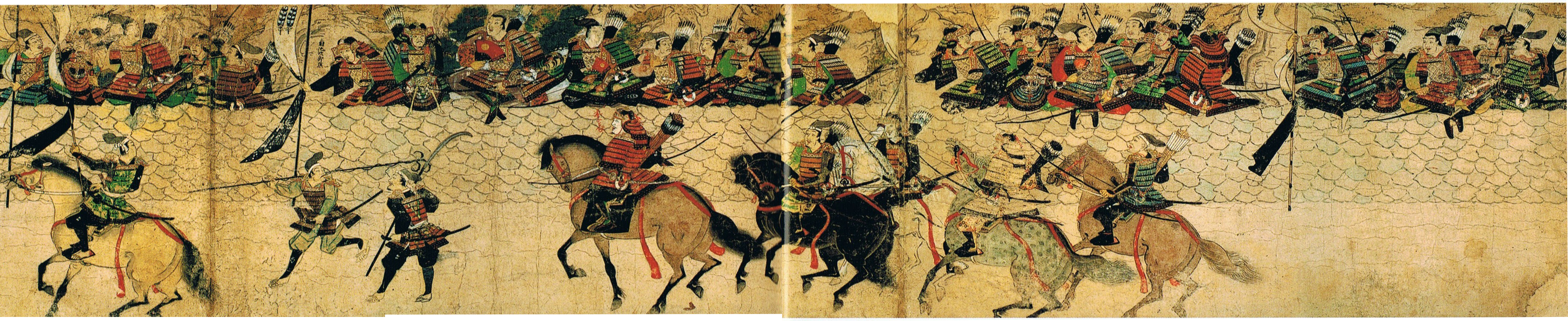 『蒙古襲来絵詞』後巻、絵十二【弘安の役】菊池武房らが陣取る石築地前を通って出陣する竹崎季長一行。